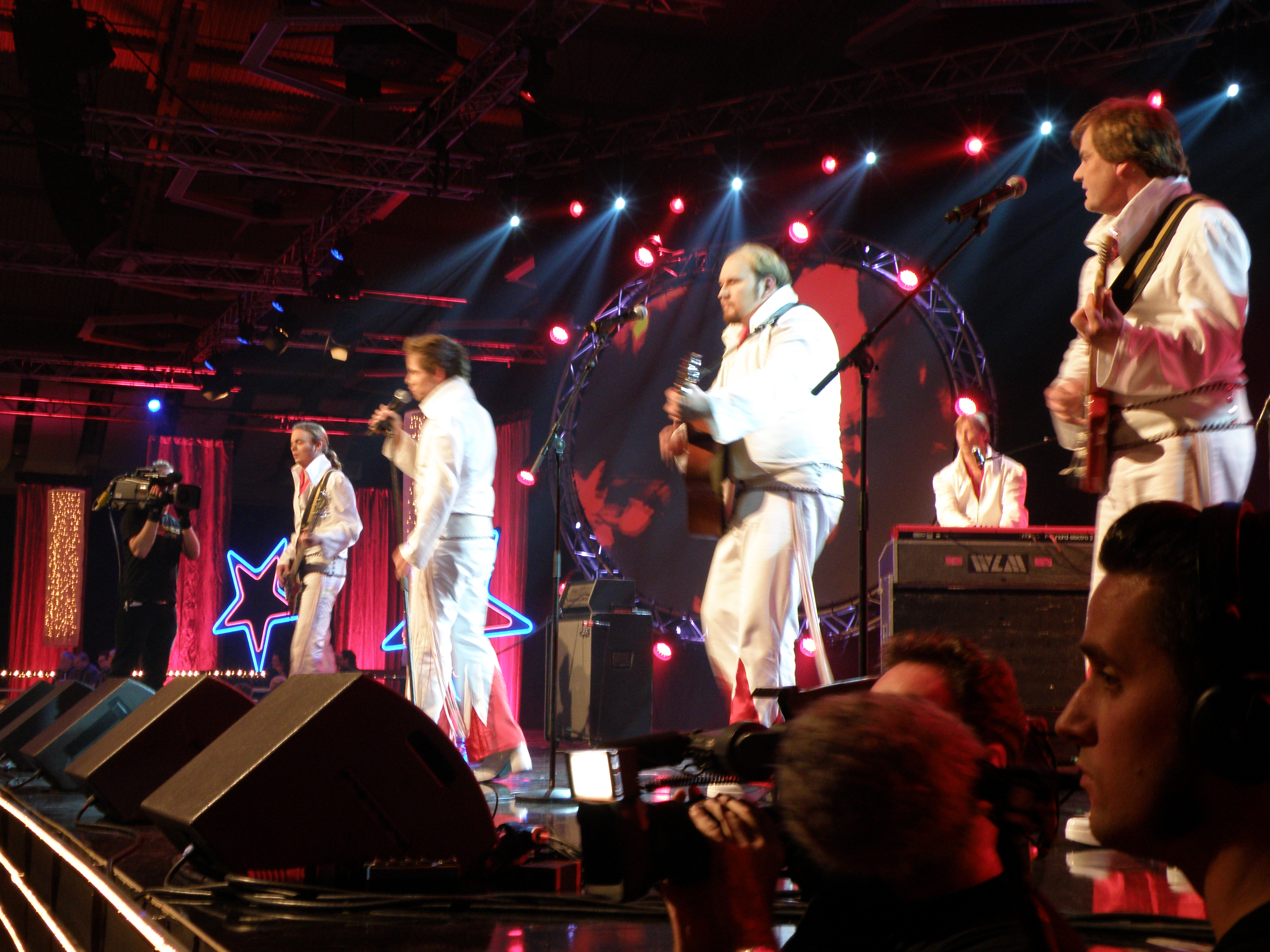 Larz-Kristerz framför Corrine Corrina i avsnitt fyra av TV-programmet Dansbandskampen